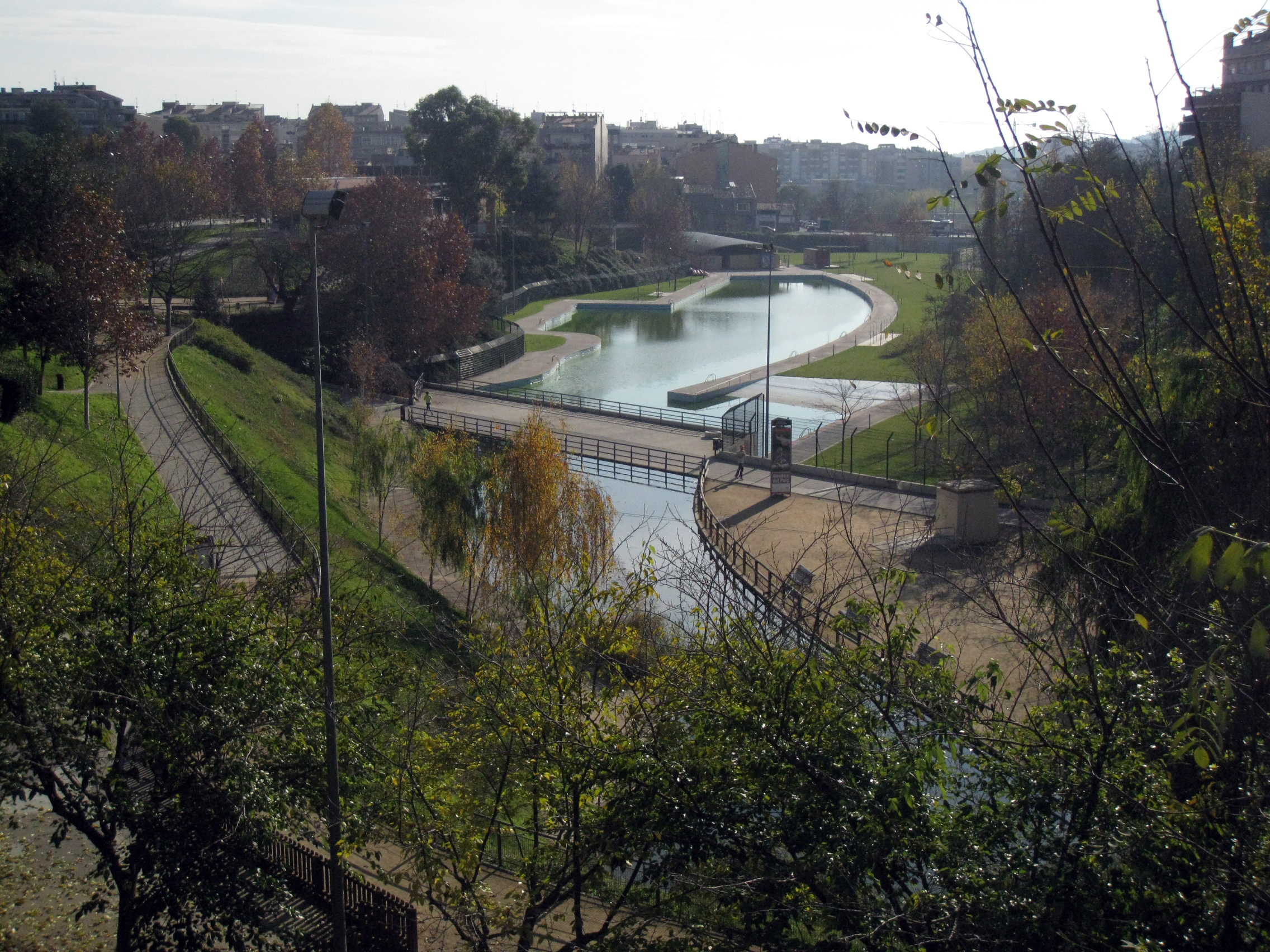 Parc de Vallparadís (Terrassa), pla_del_Mas_de_la_Castlania_i_estany.